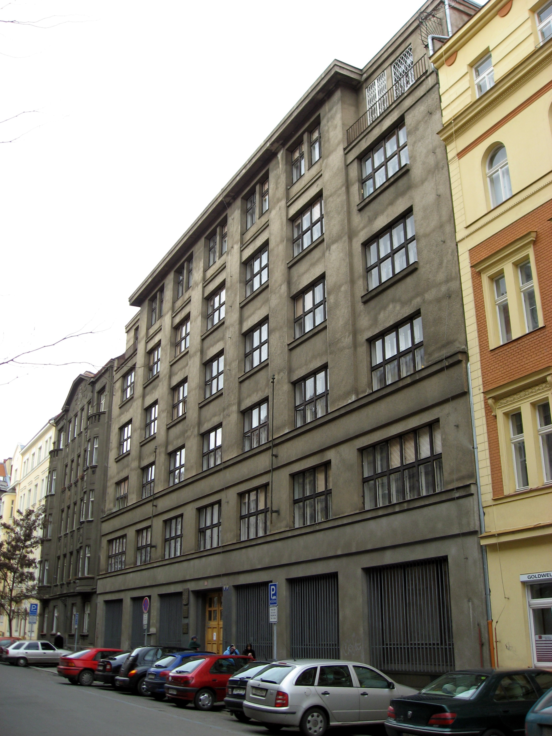 Praha, Vinohrady, Jagellonská ulice, Obvodní soud pro Prahu 3